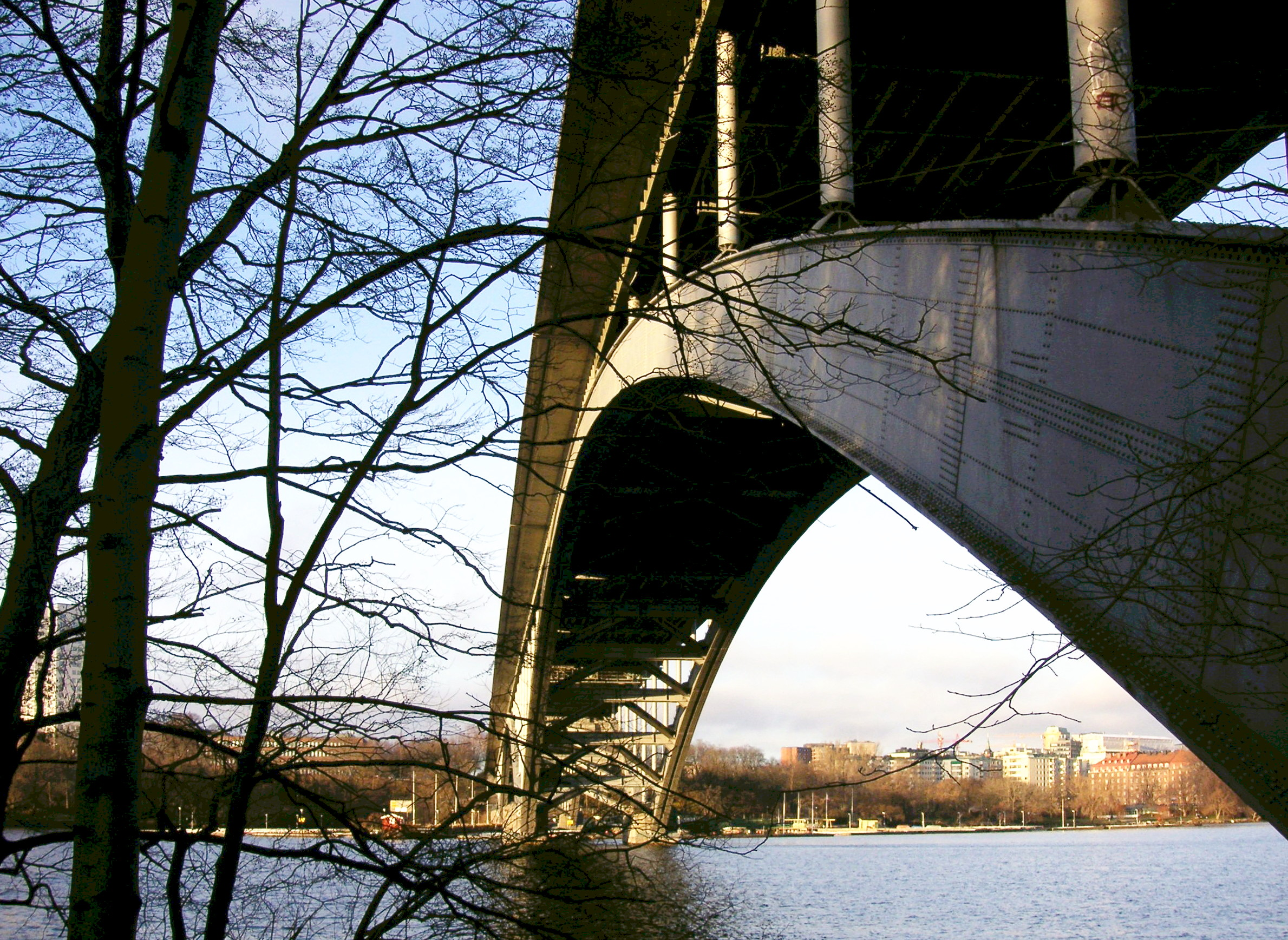 Västerbrons brospann på Långholmen